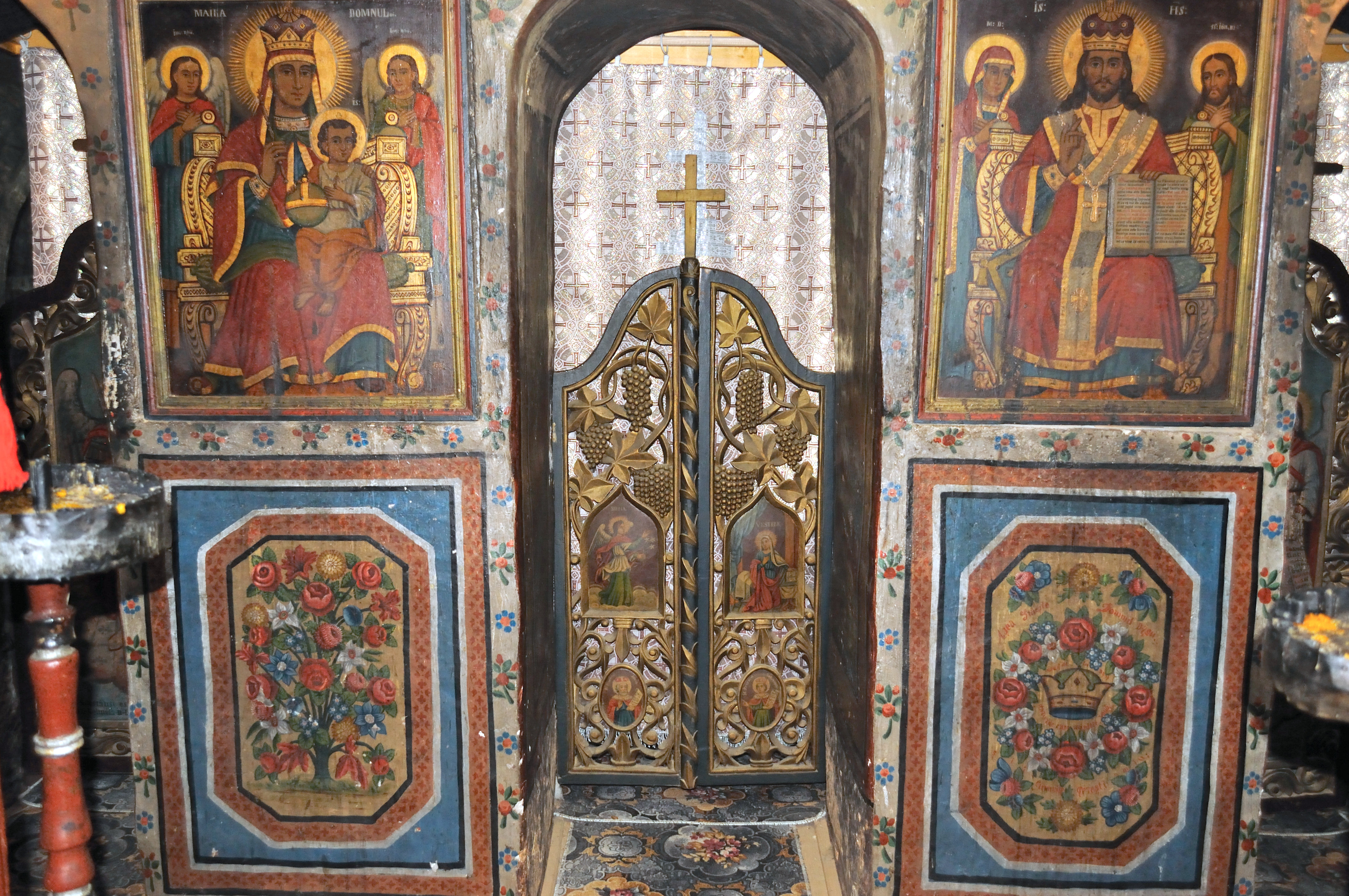 Biserica de lemn „Buna Vestire”, sat Bărbătești, cătun Iernaticu, Vâlcea